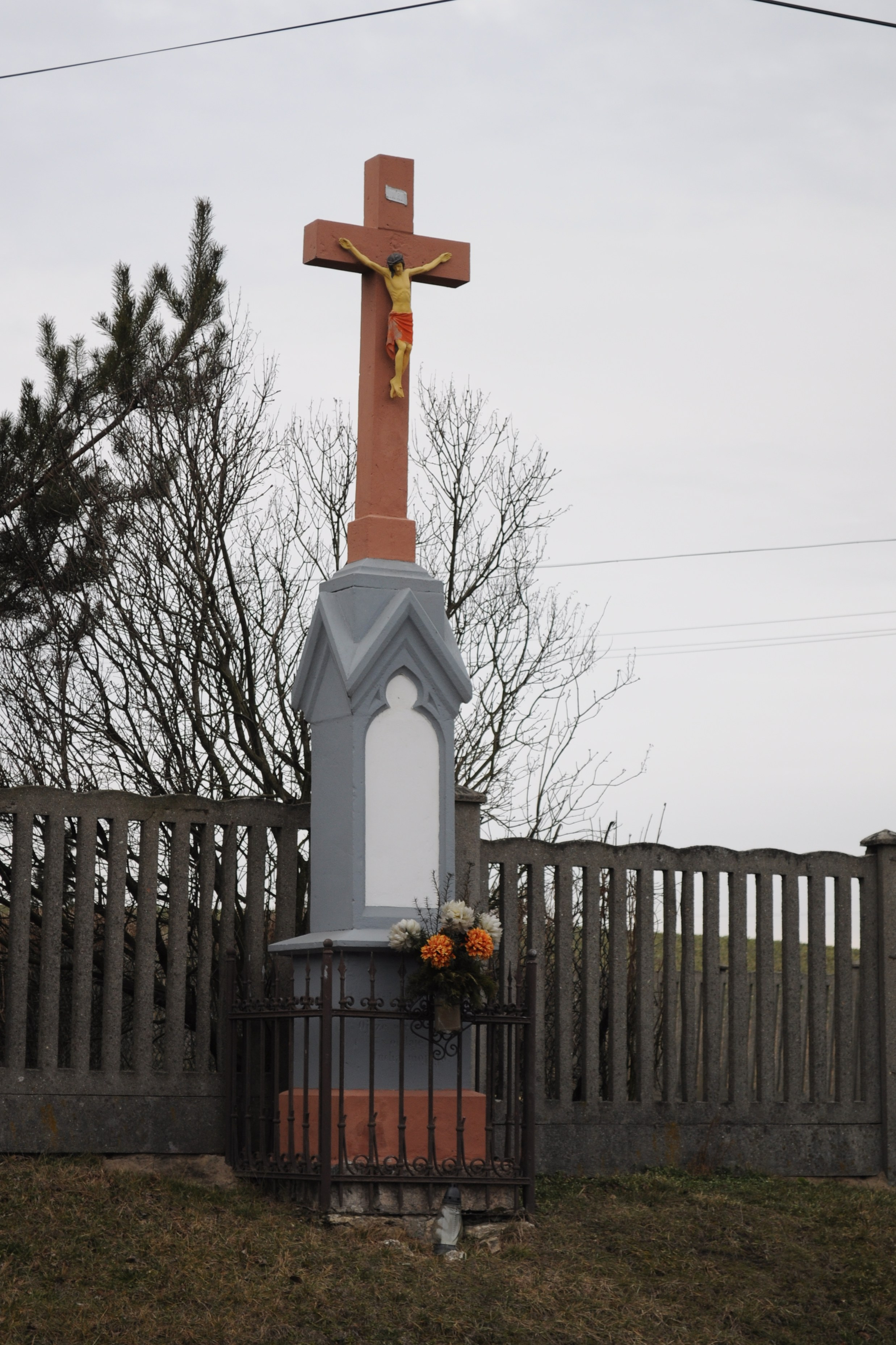 Zbrosławice. Ulica Wolności. Krzyz.